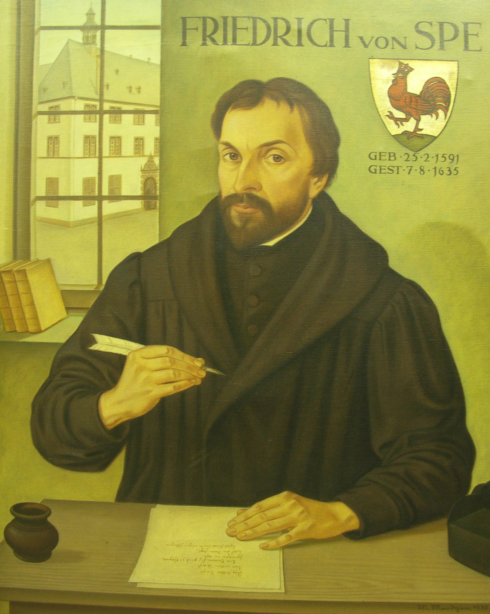 Martin Mendgen: Porträt Friedrich Spee, 1938, Öl auf Leinwand, 130 x 90 cm, Stadtmuseum Simeonstift Trier, Inv. Nr. III 1298. Die Handschrift auf dem Papier ist die erste Strophe des „Trawr-Gesang von der Noth Christi am Oelberg in dem Garten“ aus Spees Gedichtsammlung „Trutz Nachtigal“, Köln 1649: 1. Bey stiller Nacht / zur ersten wacht Ein stim sich gunt zu klagen/ Ich nam in acht/ waß sie doch sagt/ Thät hin mit Augen schlagen. (nach